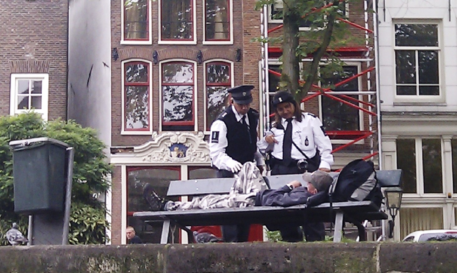 Stadswachten in Amsterdam wekken een man die op een bankje in slaap is gevallen.